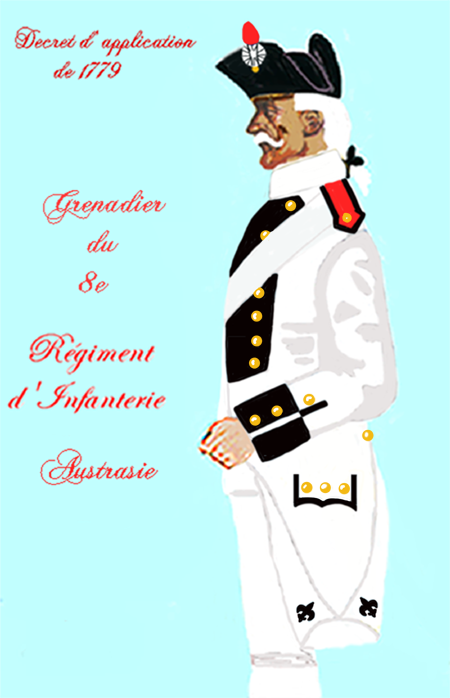 Uniform of a royal french infantry regiment from 1779 . Taken from: „LES UNIFORMES ET LES DRAPEAUX DE L'ARMÉE DU ROI“ Marseille 1899.